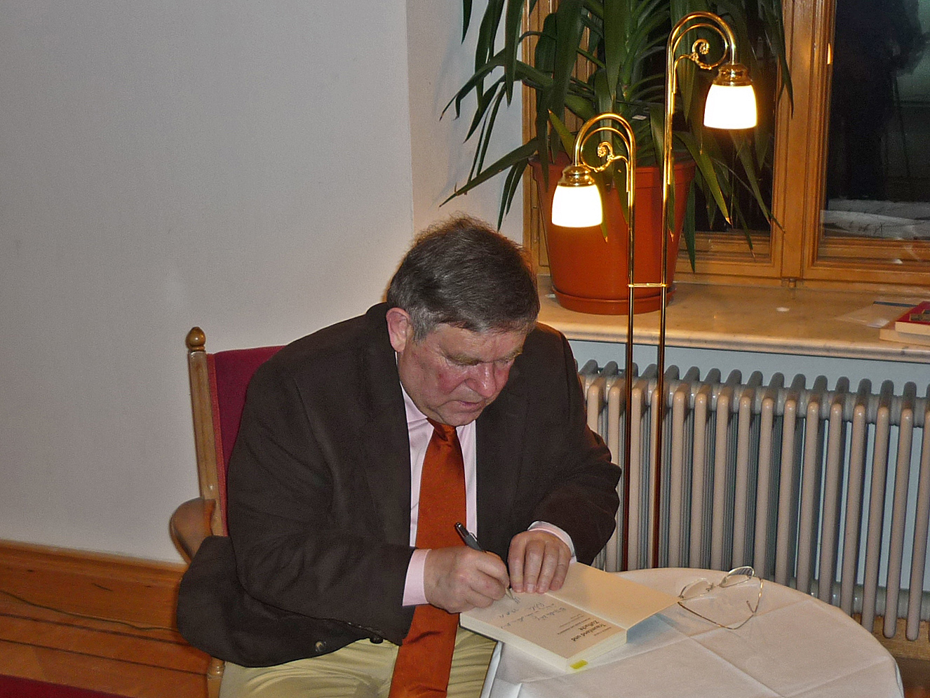 Der Schriftsteller Manfred Flügge beim Signieren seines Buches: "Traumland und Zuflucht - Heinrich Mann in Frankreich" anlässlich der Verleihung des Literaturpreises "Hommage à la France" am 29. Nov. 2014 im Lingnerschloss in Dresden